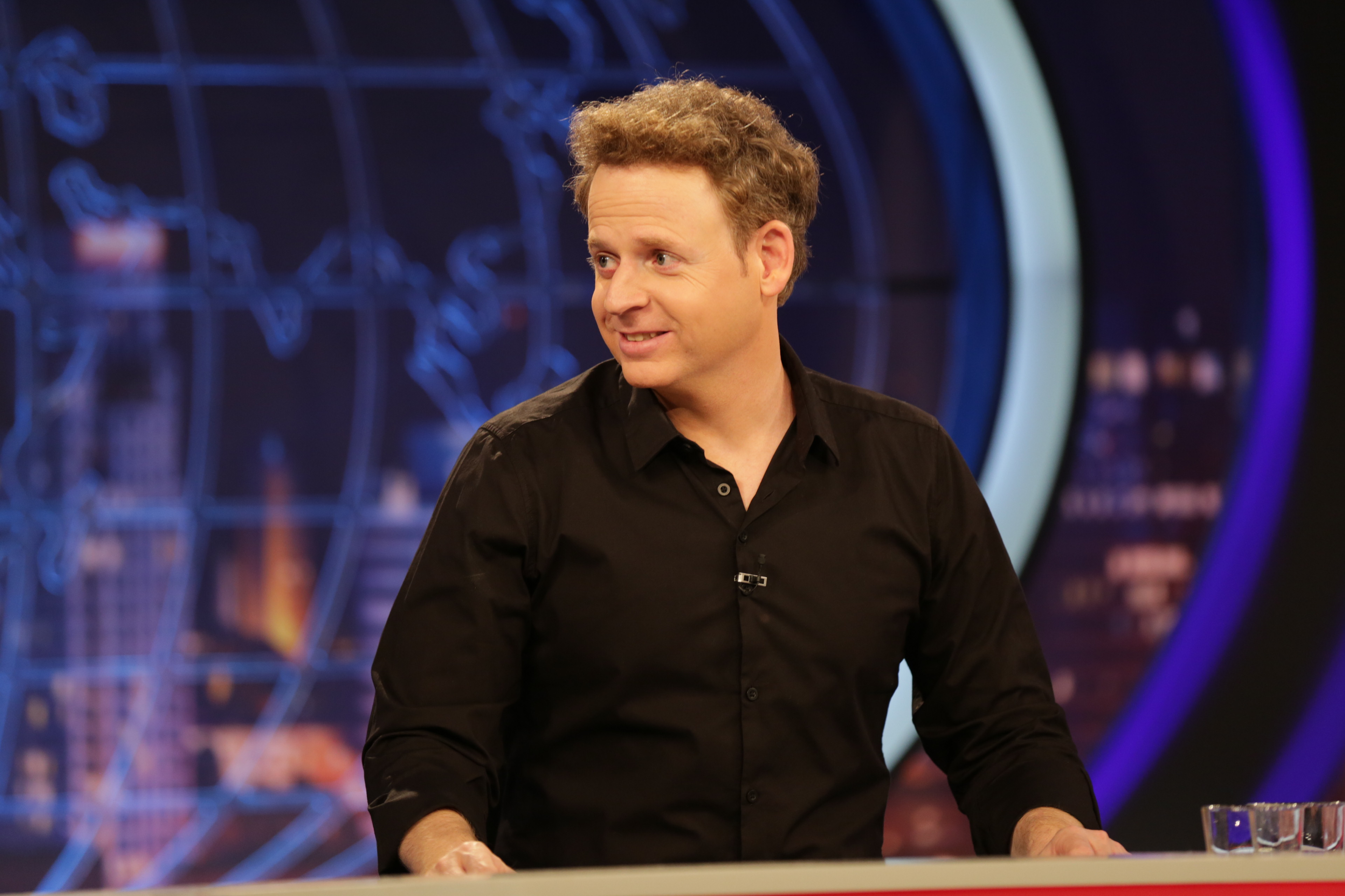 ליאור שליין באולפן גב האומה